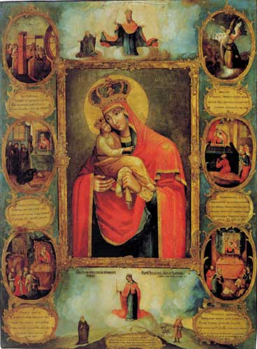 Багародзіца Пачаеўская з цудамі. 2-я пал. XVIII ст., Валынь